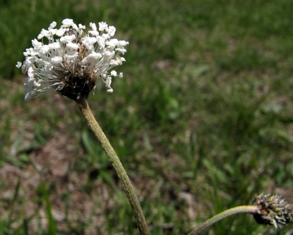 Srebrni trpotec v Devinu nad Vipavo.